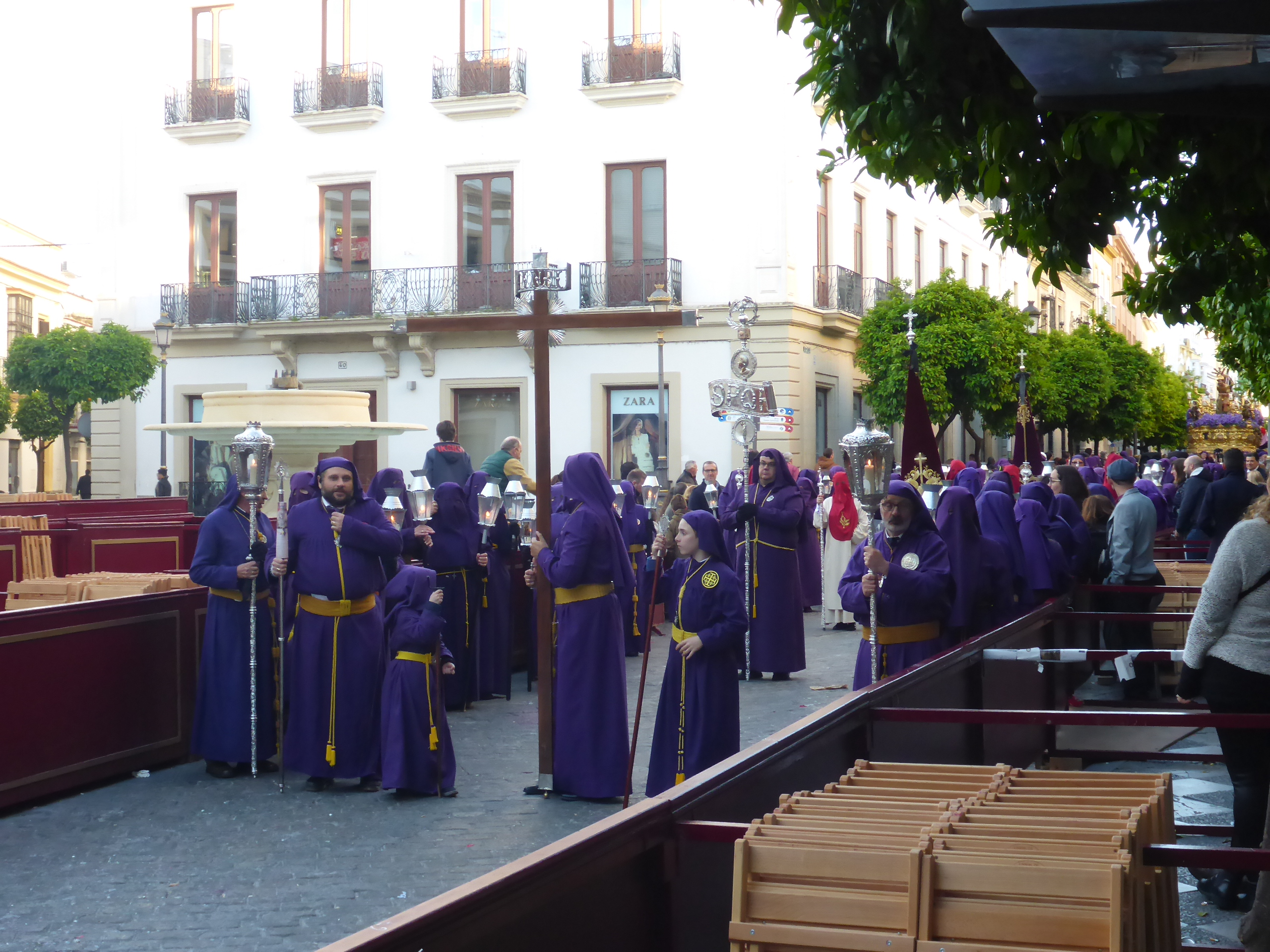 Hermandad Nuestro Padre Jesús Nazareno (Jerez)